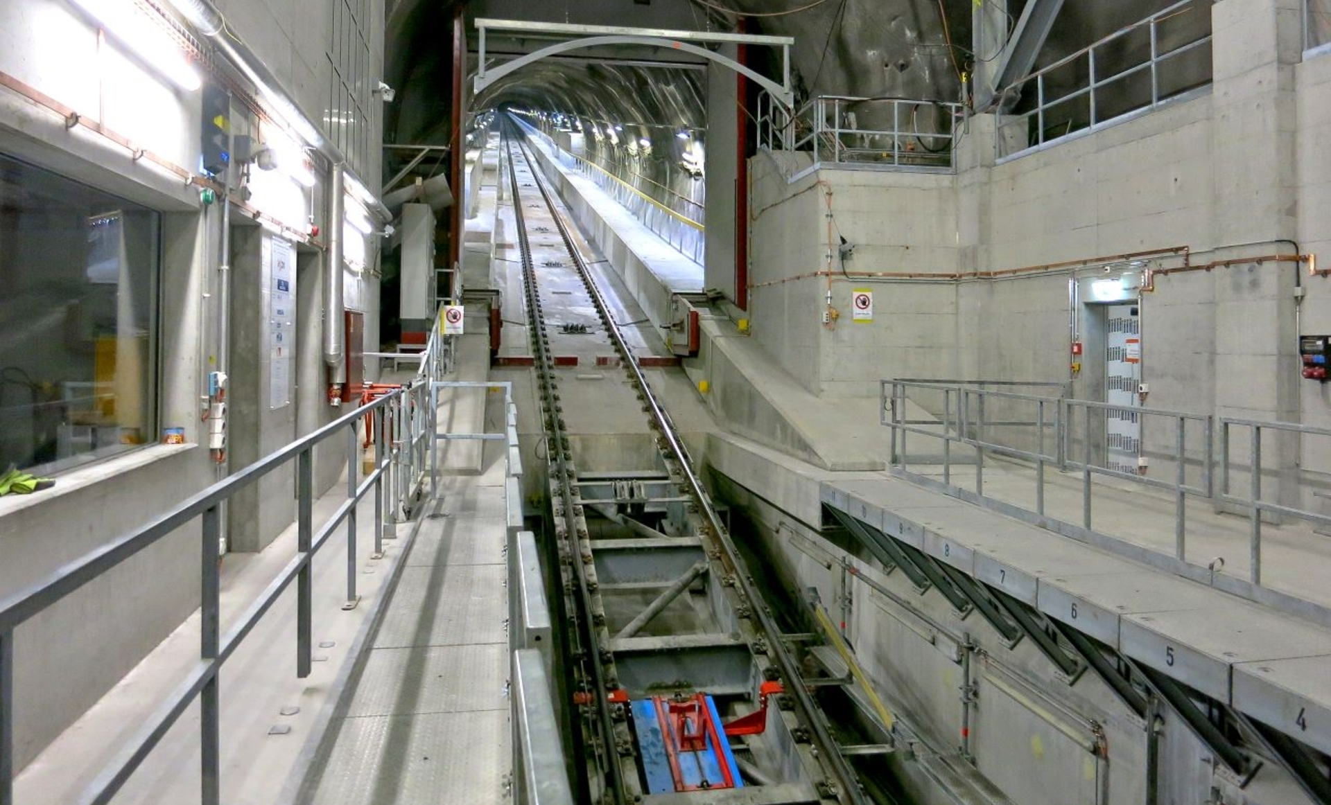 Standseilbahn von Tierfehd zur Maschinenkaverne, maximale Zuladung 215 Tonnen